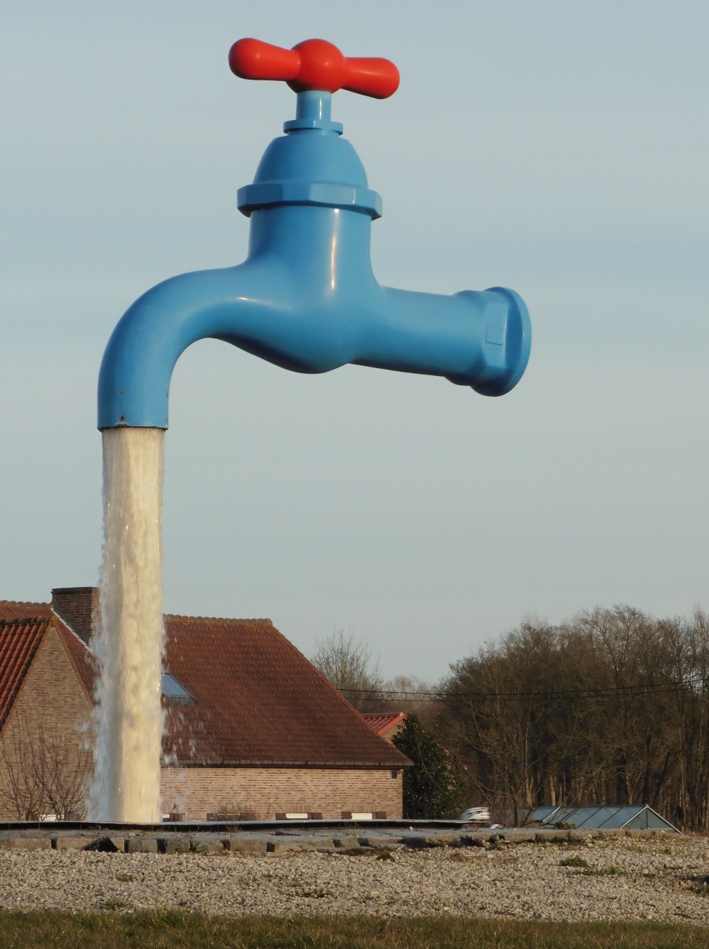 Rond point du Zuiderring N37, Zillebeke Région_flamande, Province de Flandre-Occidentale.- Belgique